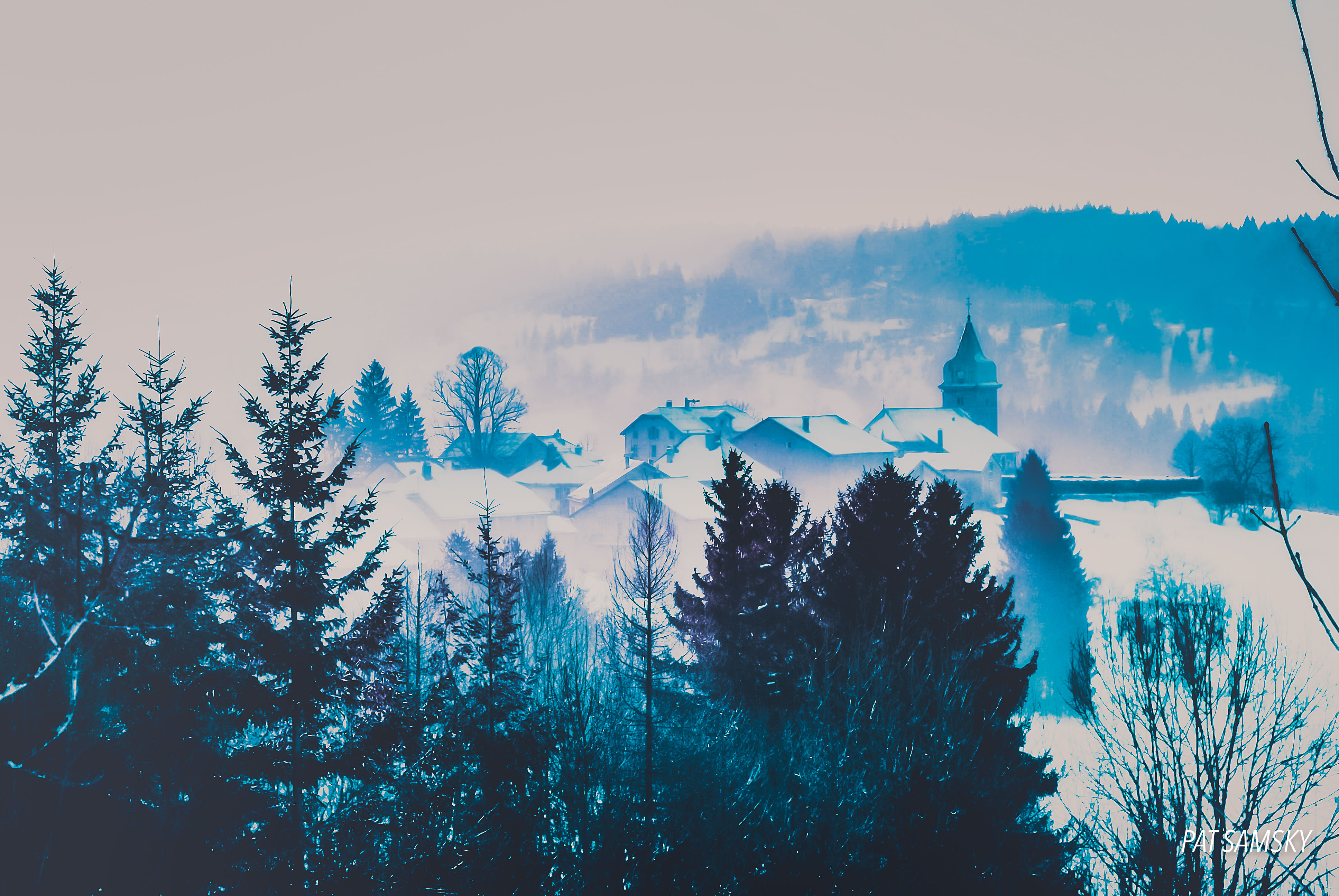 photo